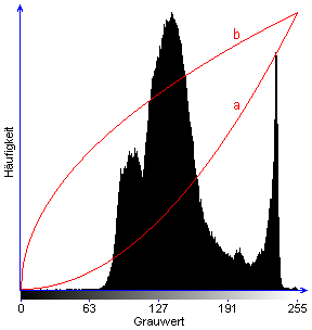 Histogramm des Bildes Area 51 640x480 grey.png mit Transformationskennlinien für Gammakorrektur (a: γ = 2; b: γ = 0.5) Quelle: selbst erstellt